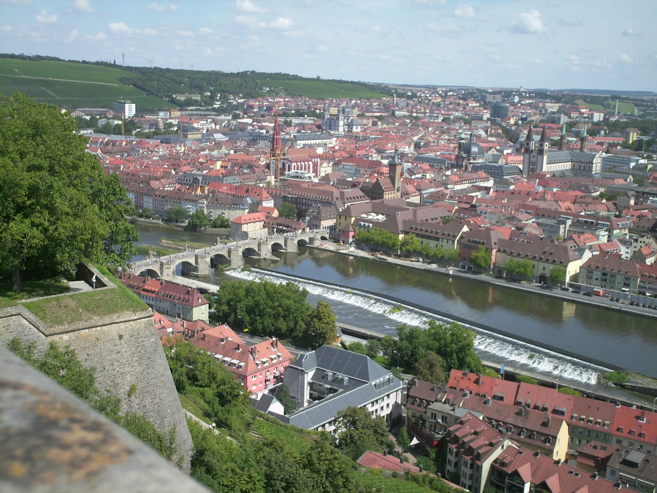 18.08.2007. _ Würzburg